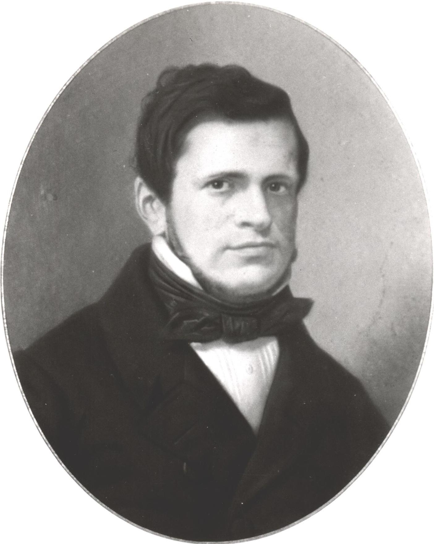 Antonio Varas de la Barra (*Cauquenes, Chile, 13 de junio de 1817 - Santiago de Chile, 3 de junio de 1886) fue político, senador y ministro chileno, considerado como uno de los más importantes del siglo XIX.